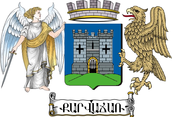 Coat of arms of Karvachar / Герб Карвачара / Wappen Karwatschars / Armoiries du Qarvachar / Stemma di Karvachar / Εθνόσημο του Kαρβατςαρ / Capa de brazos de Karvachar / Քարվաճառի զինանշանը/ Karvaçarın gerbı [1]